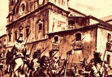 Gravura do século XIX sobre a Cabanagem.